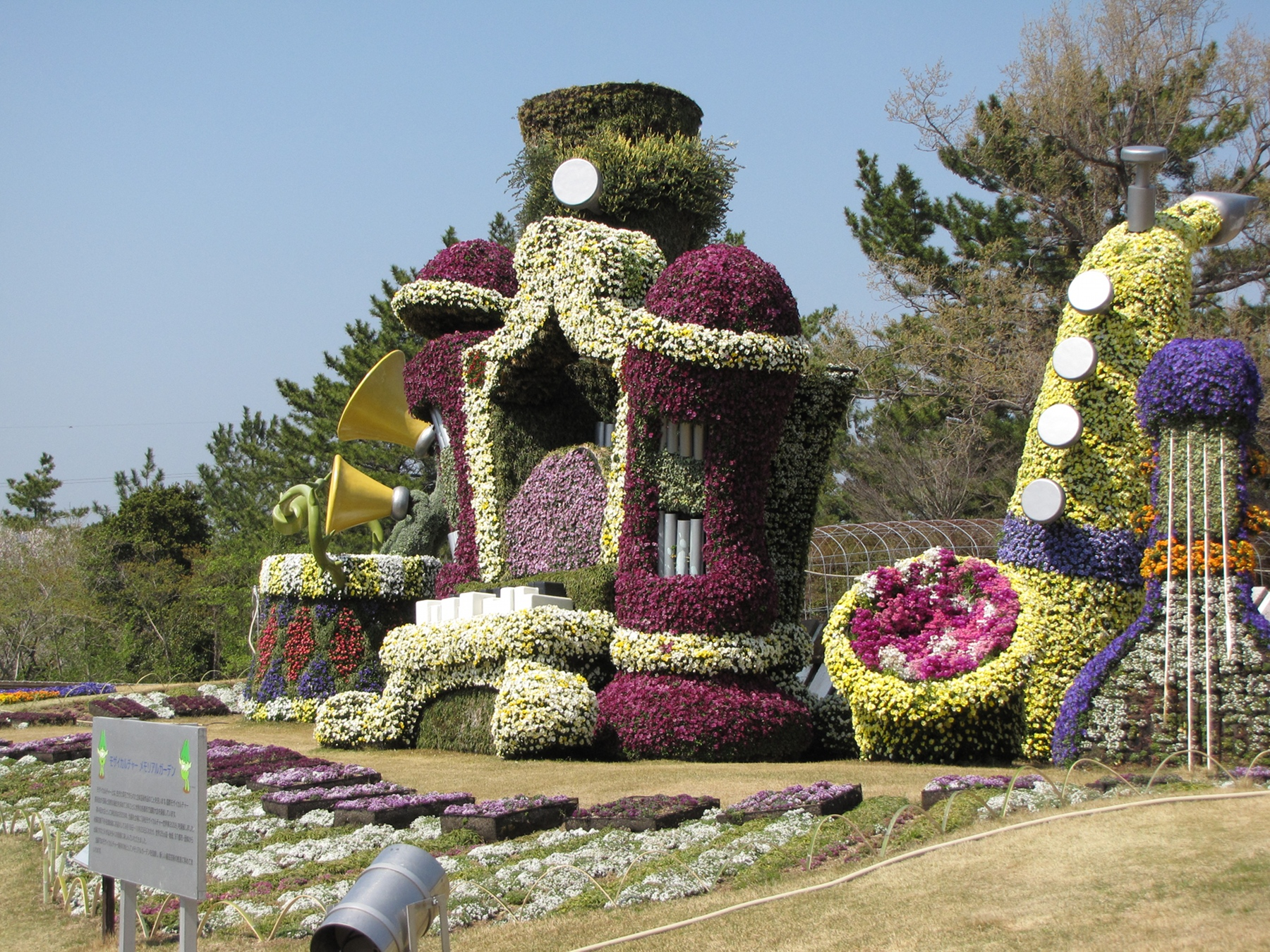 浜名湖花博2014のはままつフラワーパーク会場内展示物。モザイカルチャーメモリアルガーデン